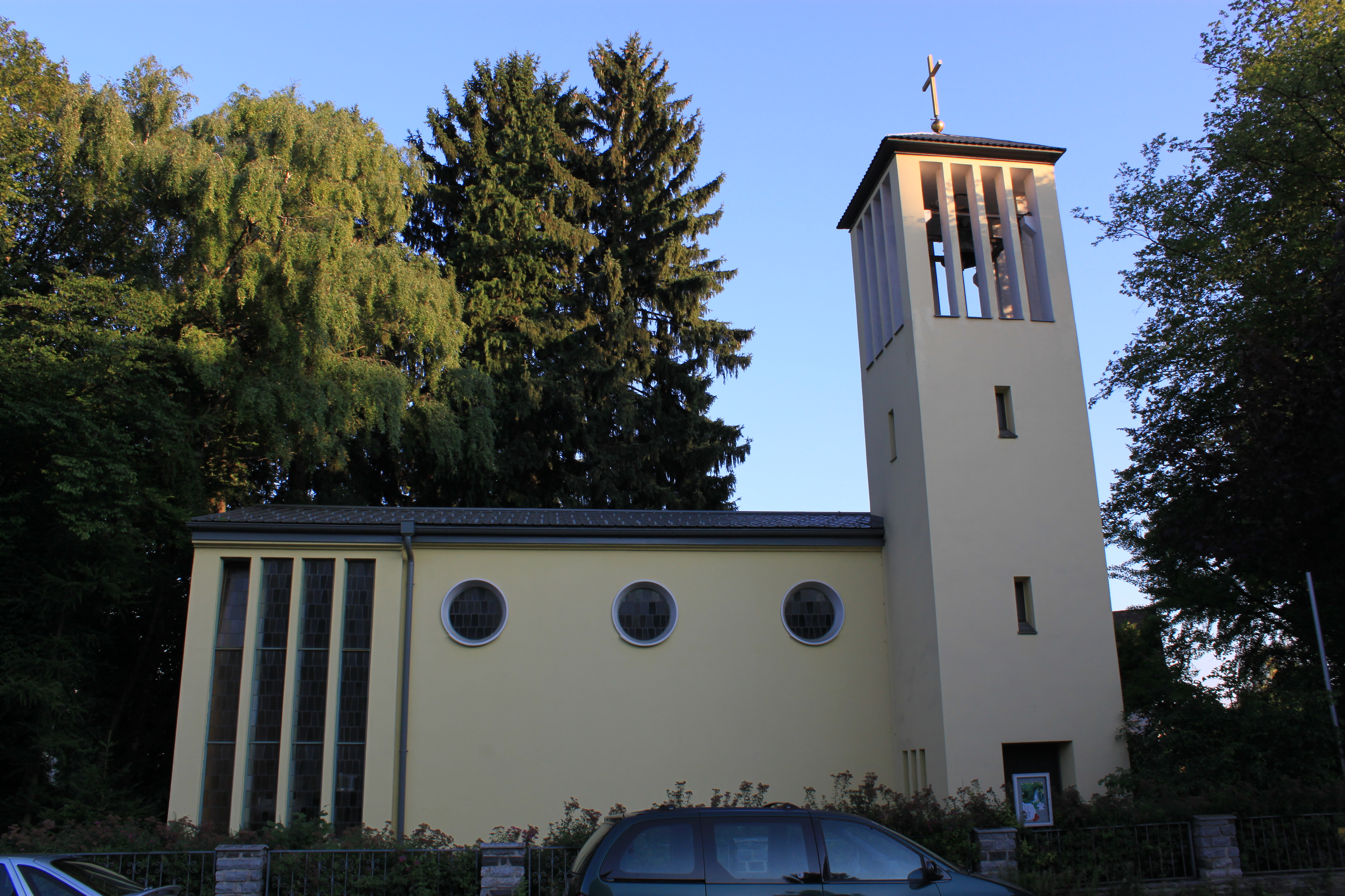 Evang. Pfarrkirche A.B. und H.B. Heilandskirche, Preinsbacherstraße 8, 3300 Amstetten